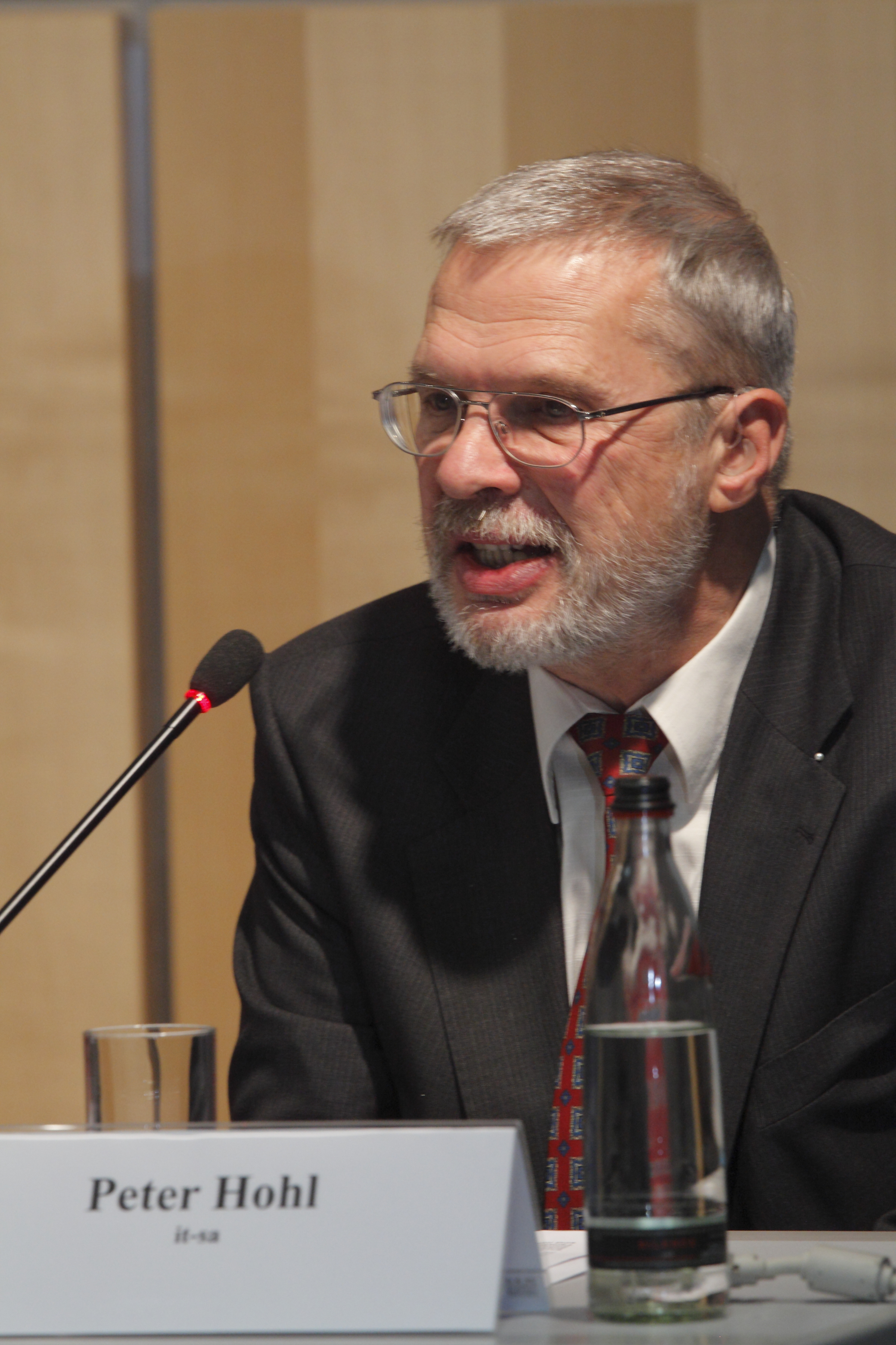 Peter Hohl (SecuMedia) auf der Fachmesse it-sa in Nürnberg Foto: Norbert Luckhardt